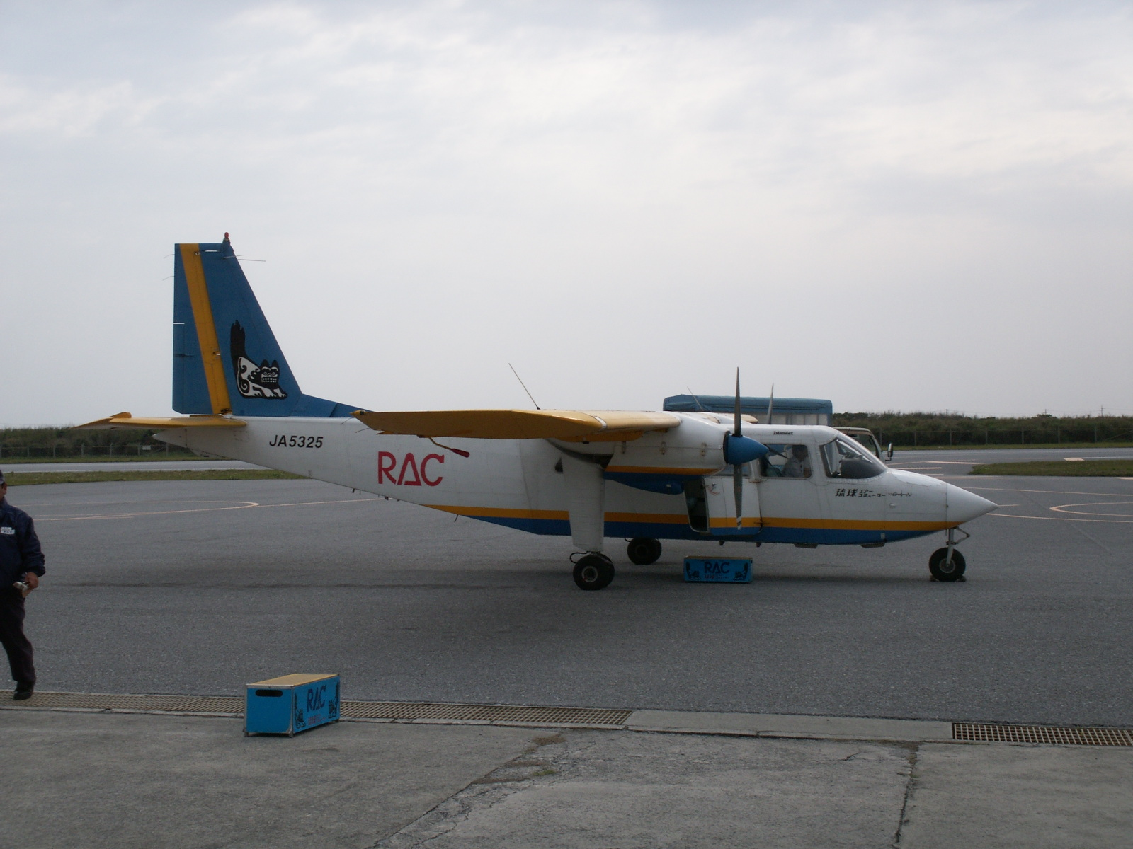 JA5235, A Britten Normen Airliner taken at Aguni Airport